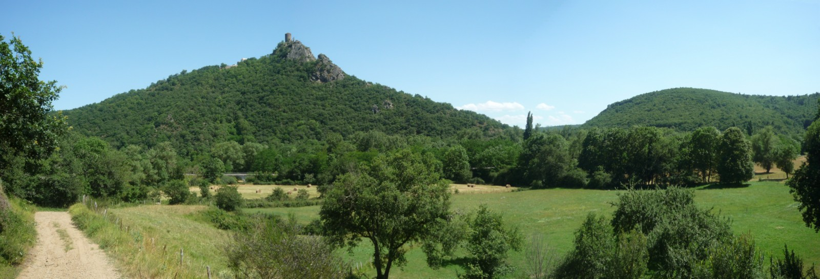 Vallée de l'Alagnon au niveau de Léotoing (Haute-Loire) France